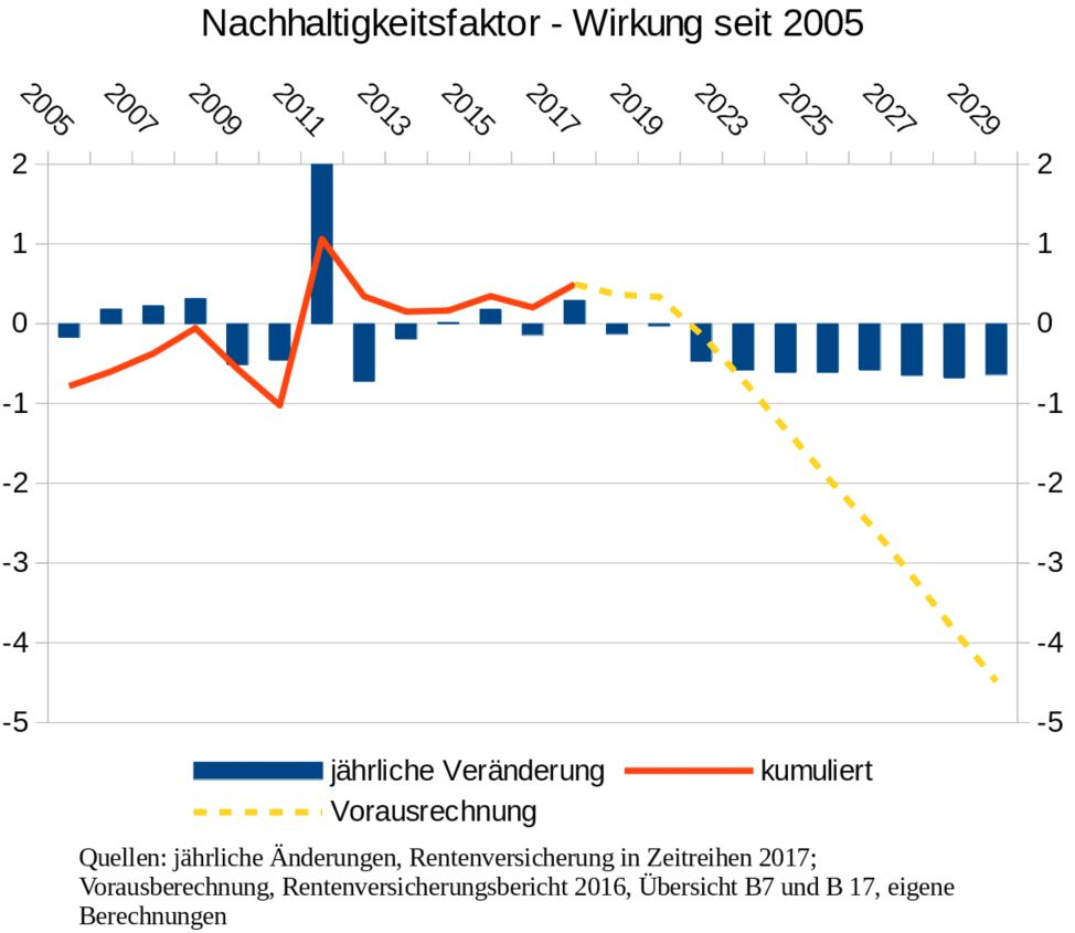 Die Grafik zeigt die Auswirkung des Nachhaltigkeitsfaktors in der Rentenanpassungsformel. Ab 2018 wird dabei auf die Vorausrechung des Rentenversicherungsberichts 2016 zurückgefriffen. Die Vorausrechnung basiert auf dem Lohn- und Beschäftigungsszenario.